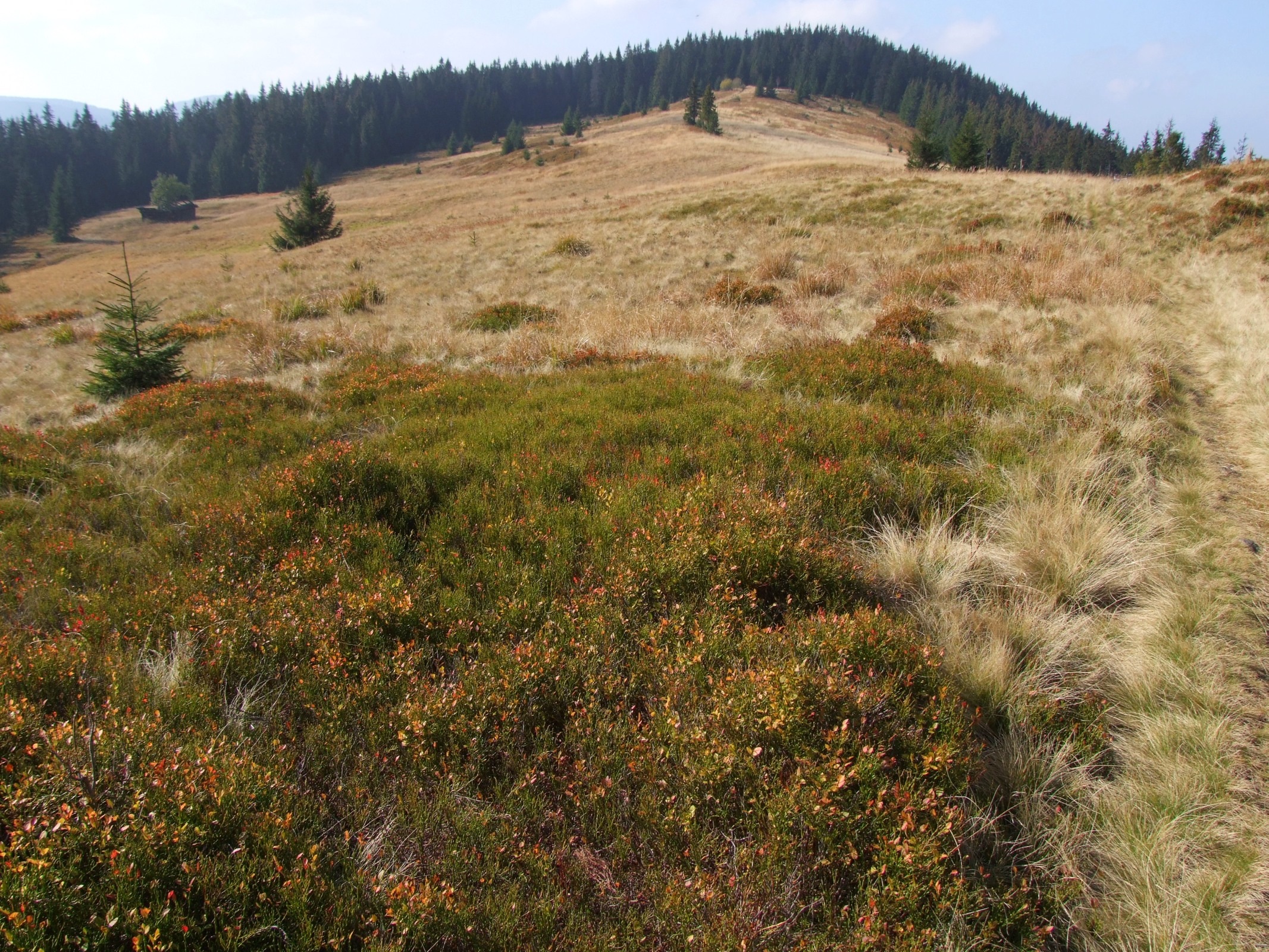 Polana Gorc Troszacki (Gorce)